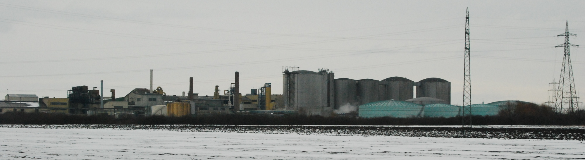 Tullner Zuckerfabrik